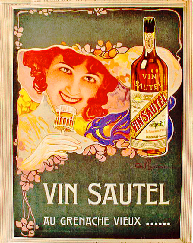 Affiche Sautel par David Dellepiane (1866-1932) vers 1920